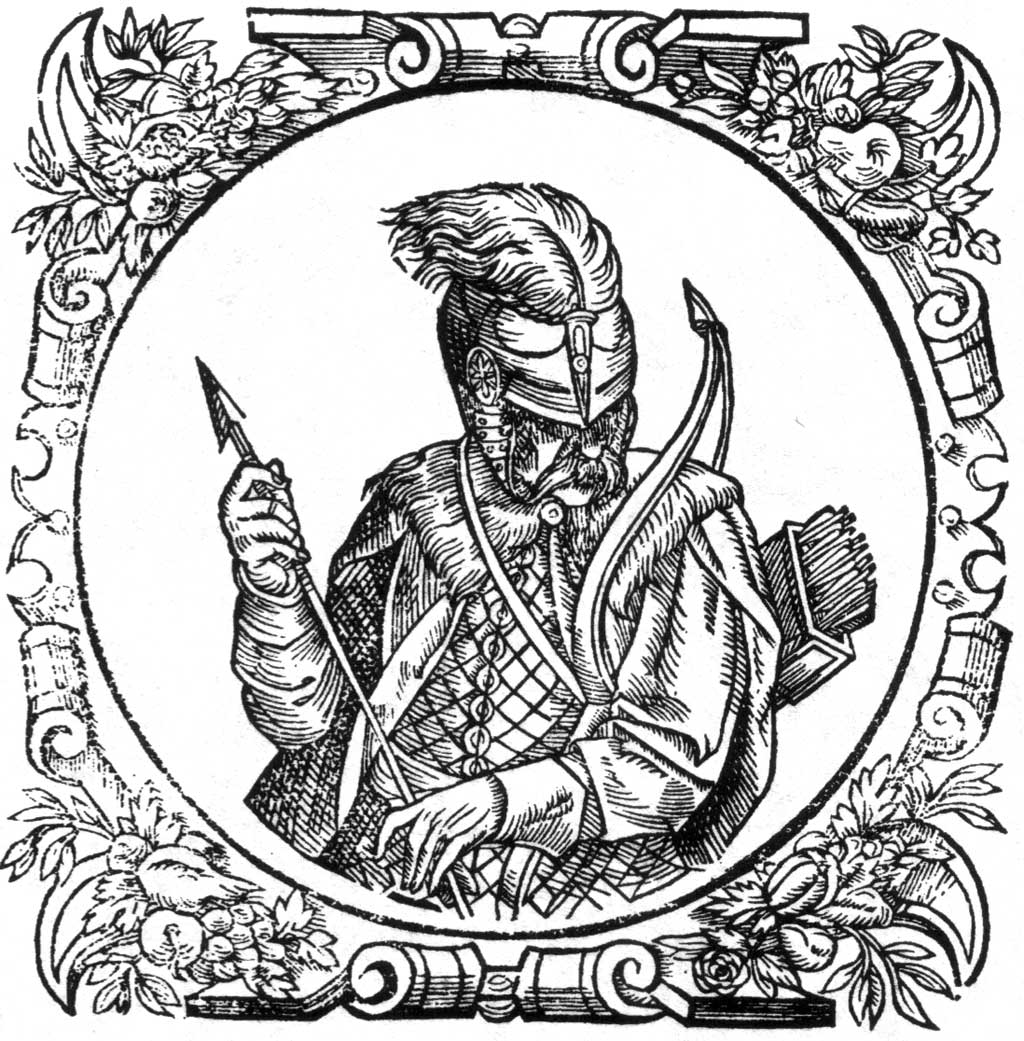 Lithuanian Grand Duke Švitrigaila